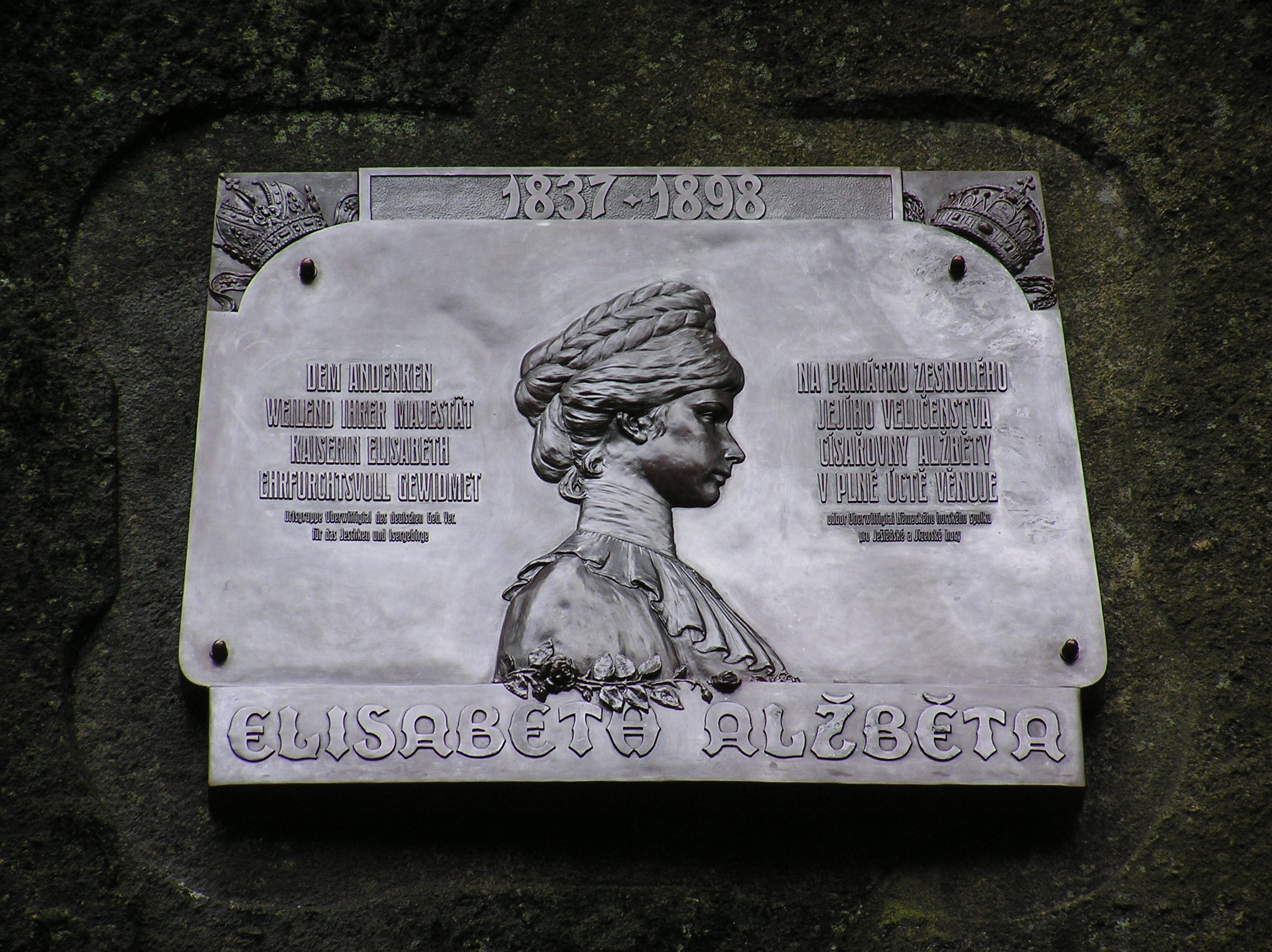 Pamětní deska císařovny Alžběty obnovena 10.9. 2011. Umístěna je v údolí Velkého Štolpichu nedaleko vodopádu v Jizerských horách